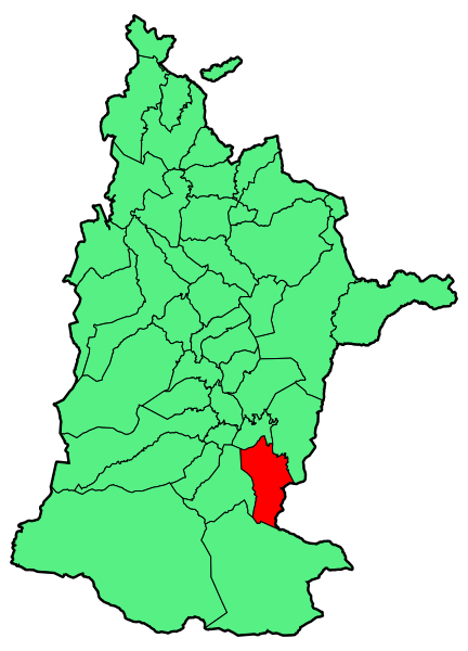 Aipaturiko udalerriaren kokapena Zuberoan